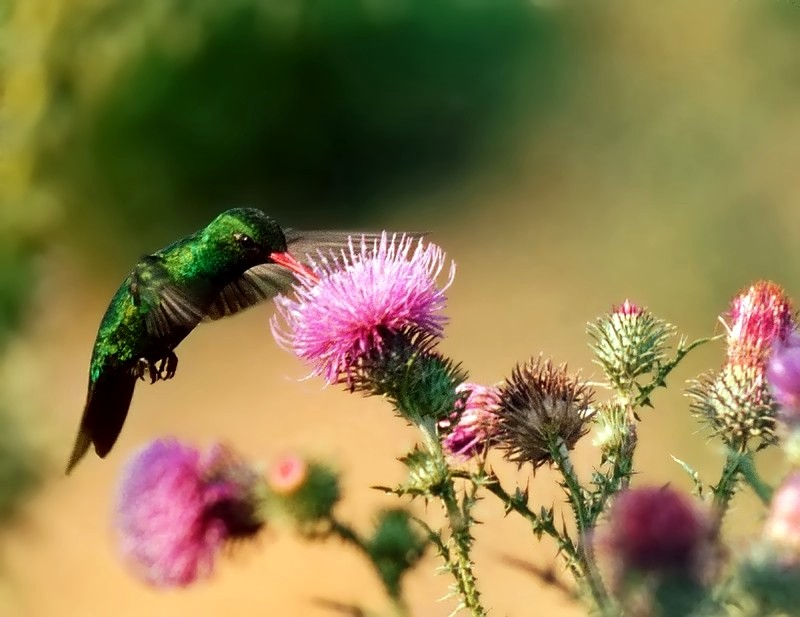 Chlorostilbon aureoventris - macho